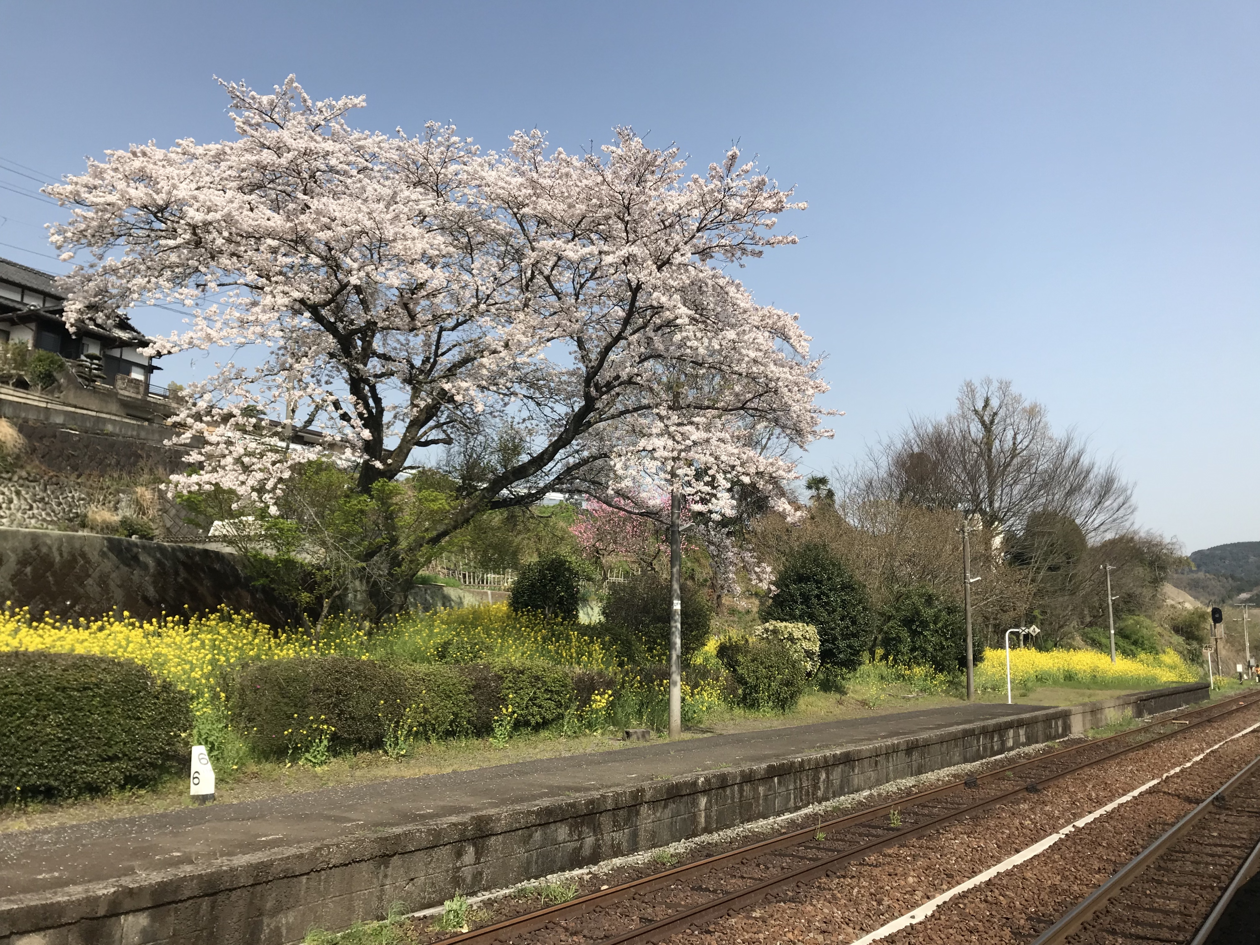 小野屋駅のホームとサクラ(奥は鬼瀬方面)